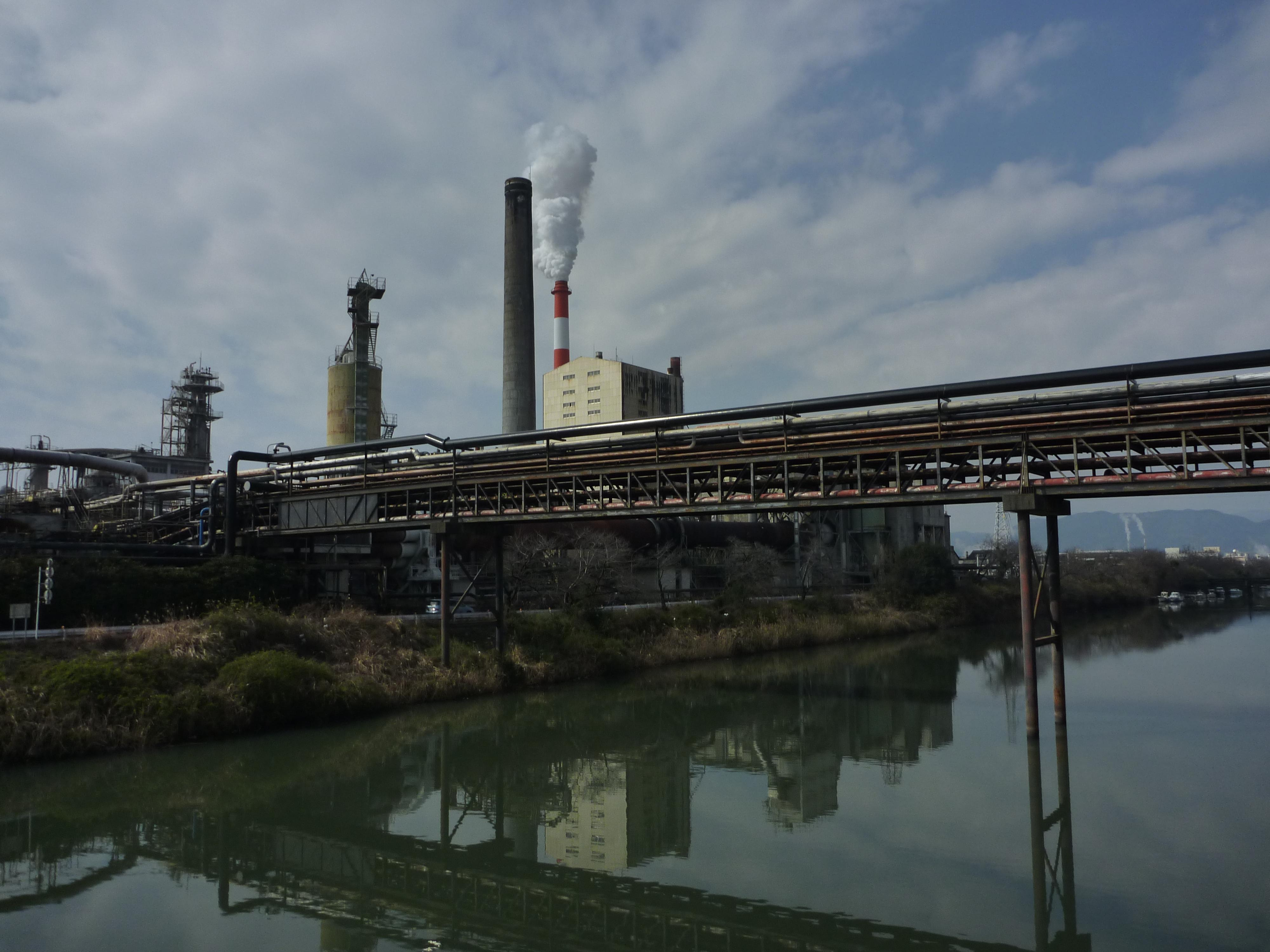 静岡県富士市今井